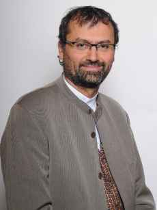 Patricio Vallespín López